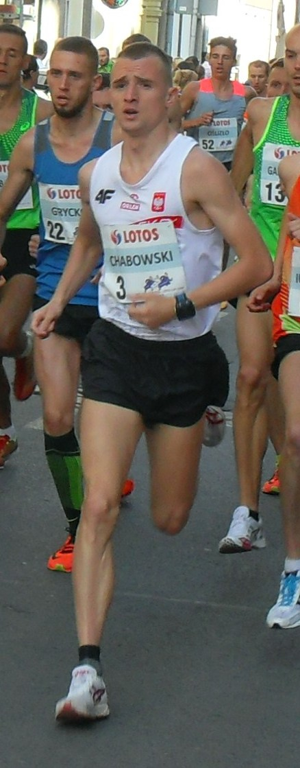 Gdańsk Główne Miasto, ul. Ogarna. Bieg św. Dominika w 2015 r.: Marcin Chabowski.